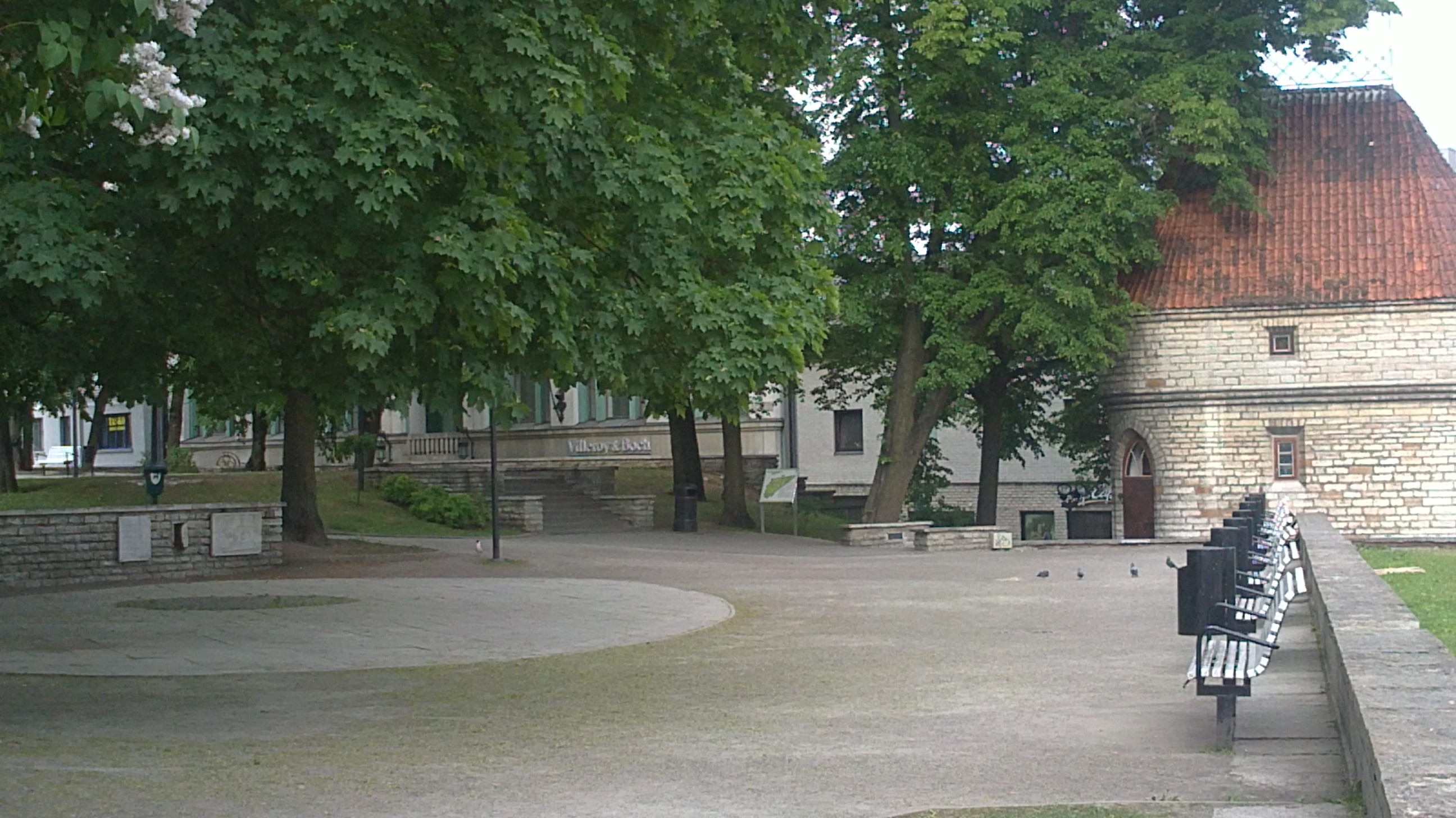 Tallinna Virumäe suveteatri plats